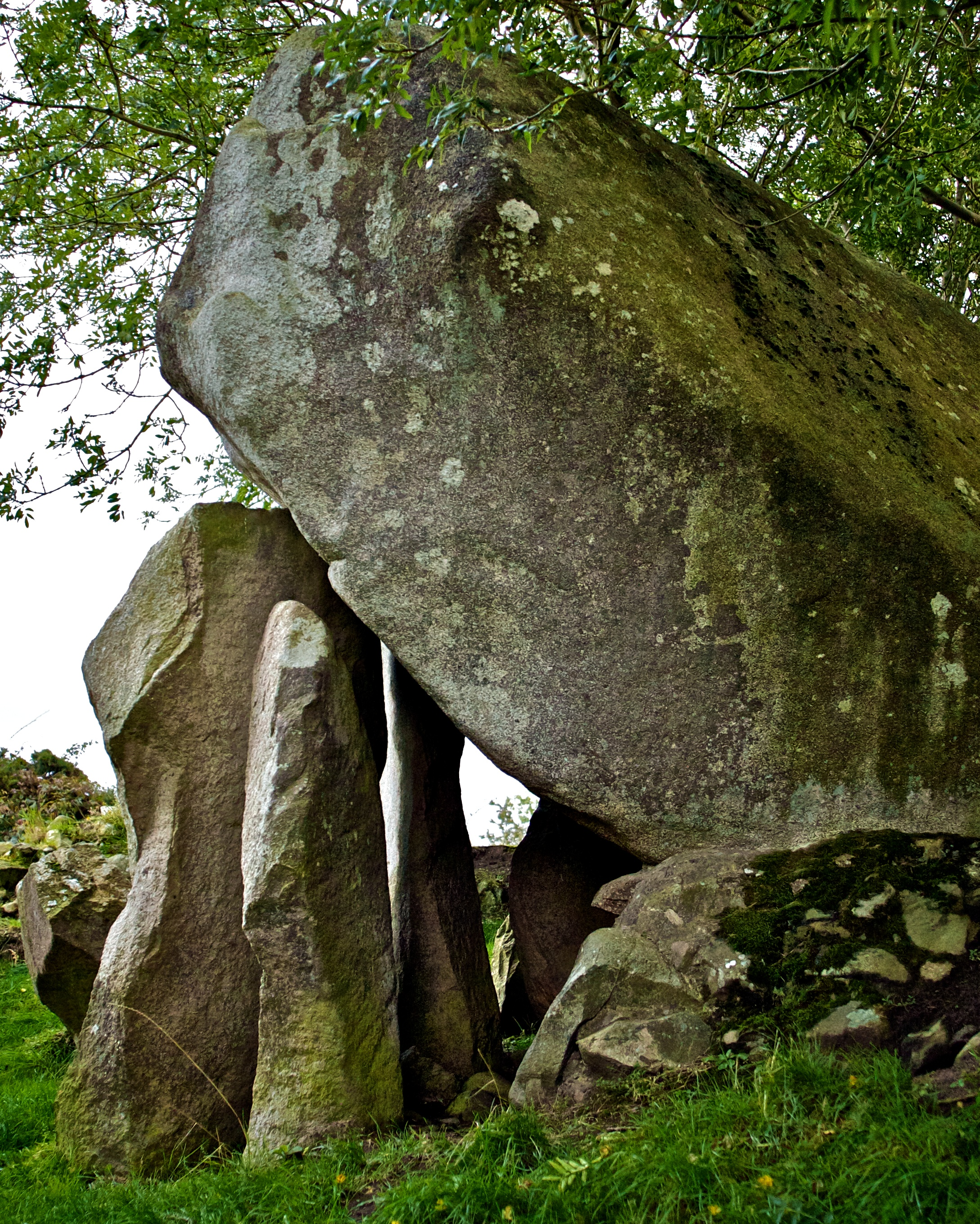 Goward Dolmen